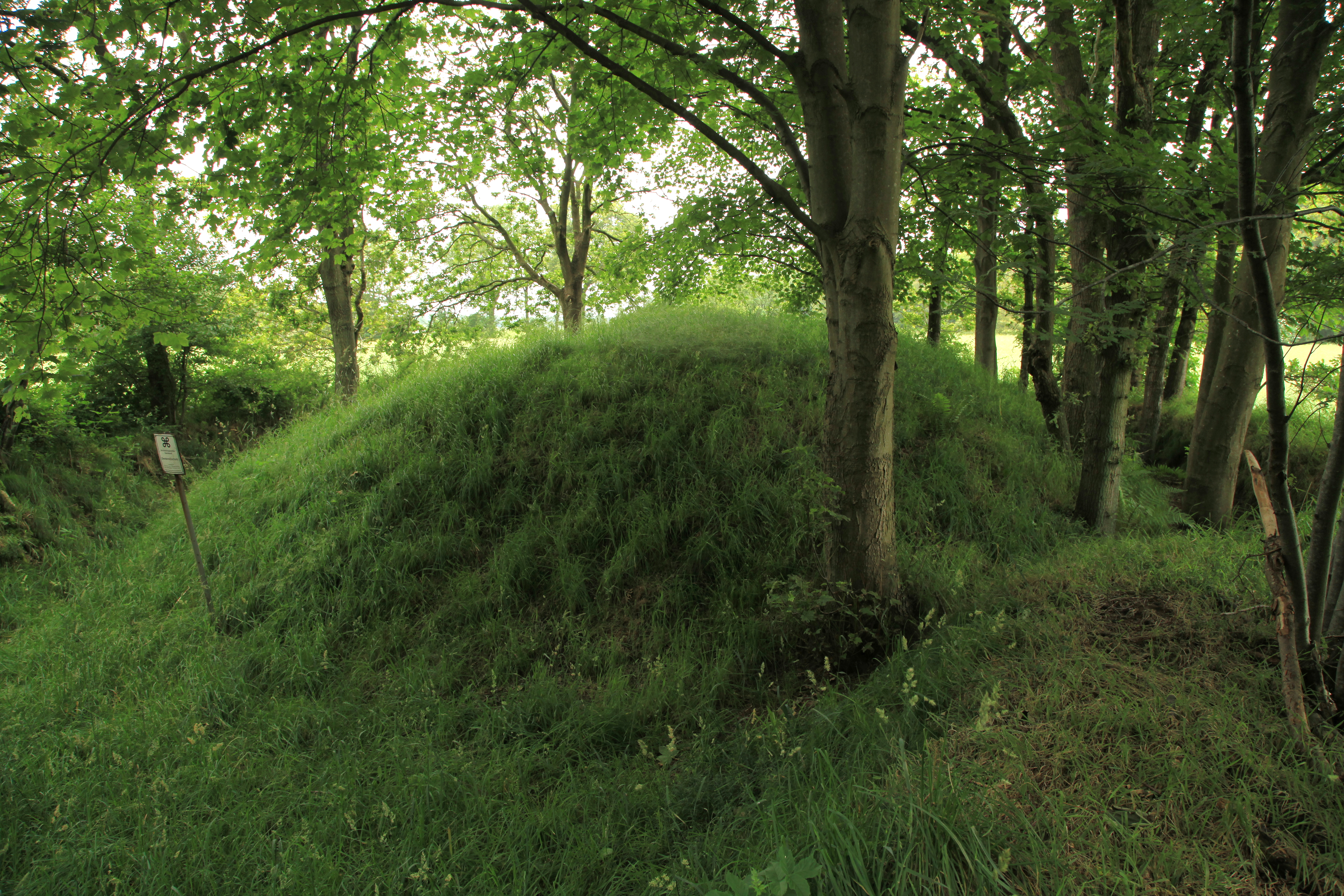 Grabkammer Linden-Pahlkrug in Linden (Dithmarschen)